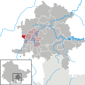 Dröbischau in Thuringia - District Saalfeld-Rudolstadt